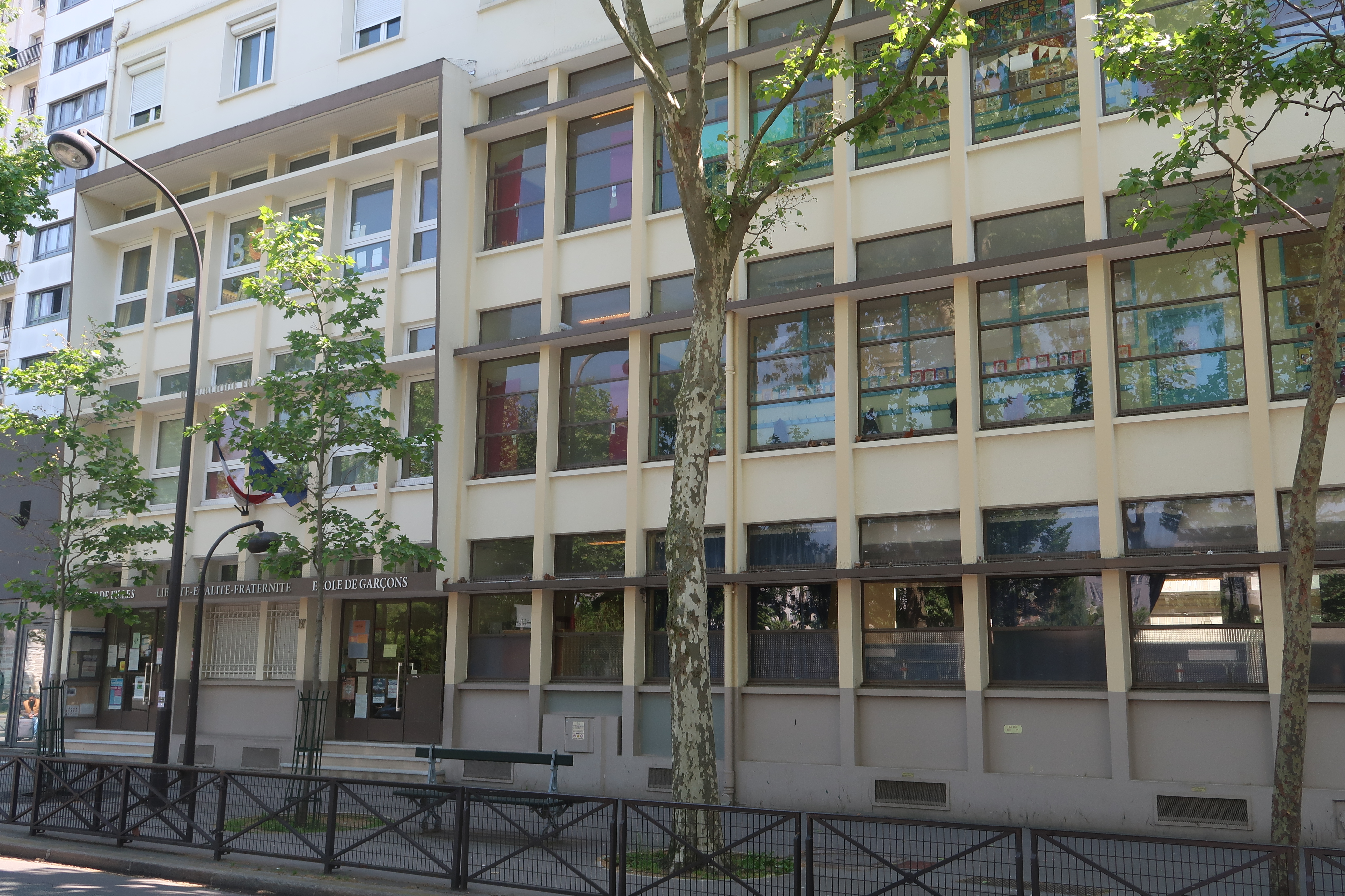 École élémentaire n°195-197 rue Saint-Charles (Paris, 15e).